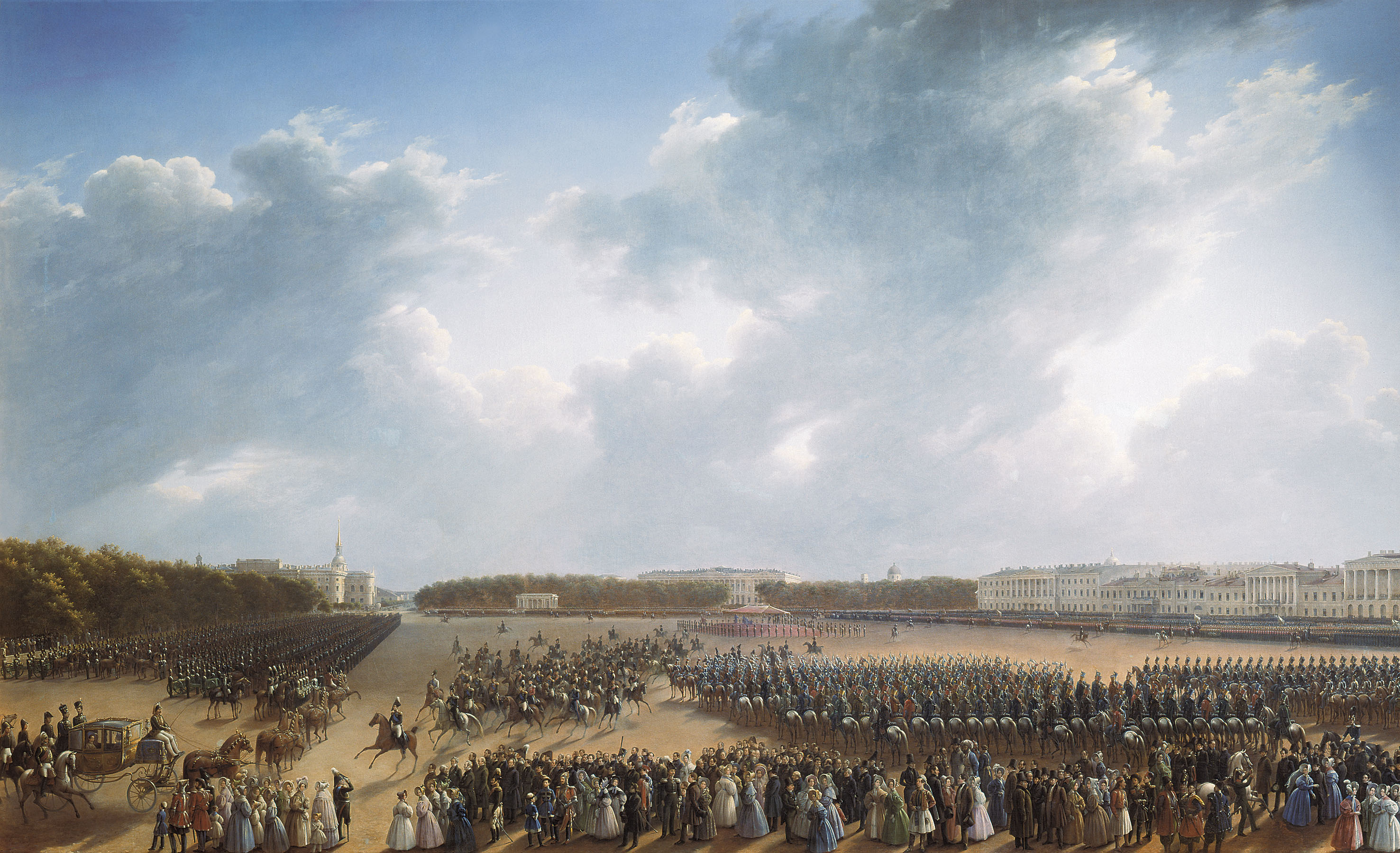 Григорій Чернецов, «Парад на Царициному лузі 6 жовтня 1831»